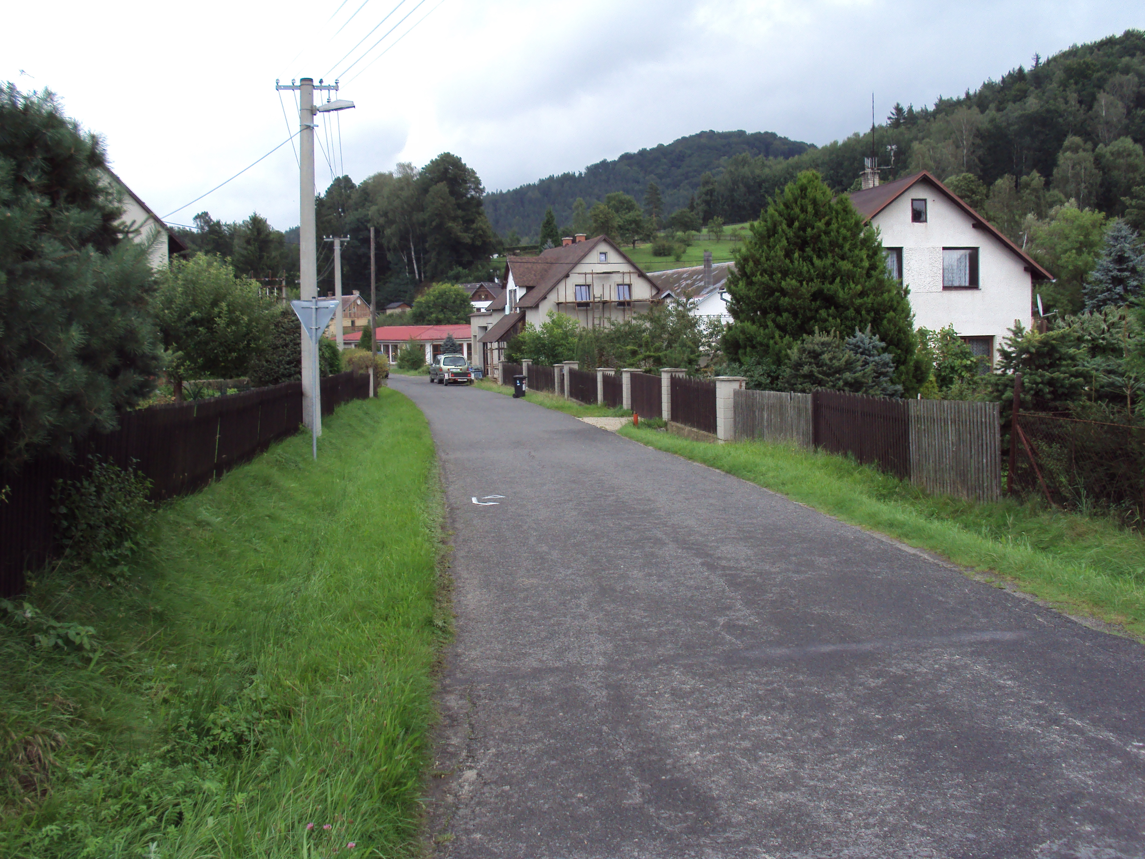 Silnice skrz obec Radvanec